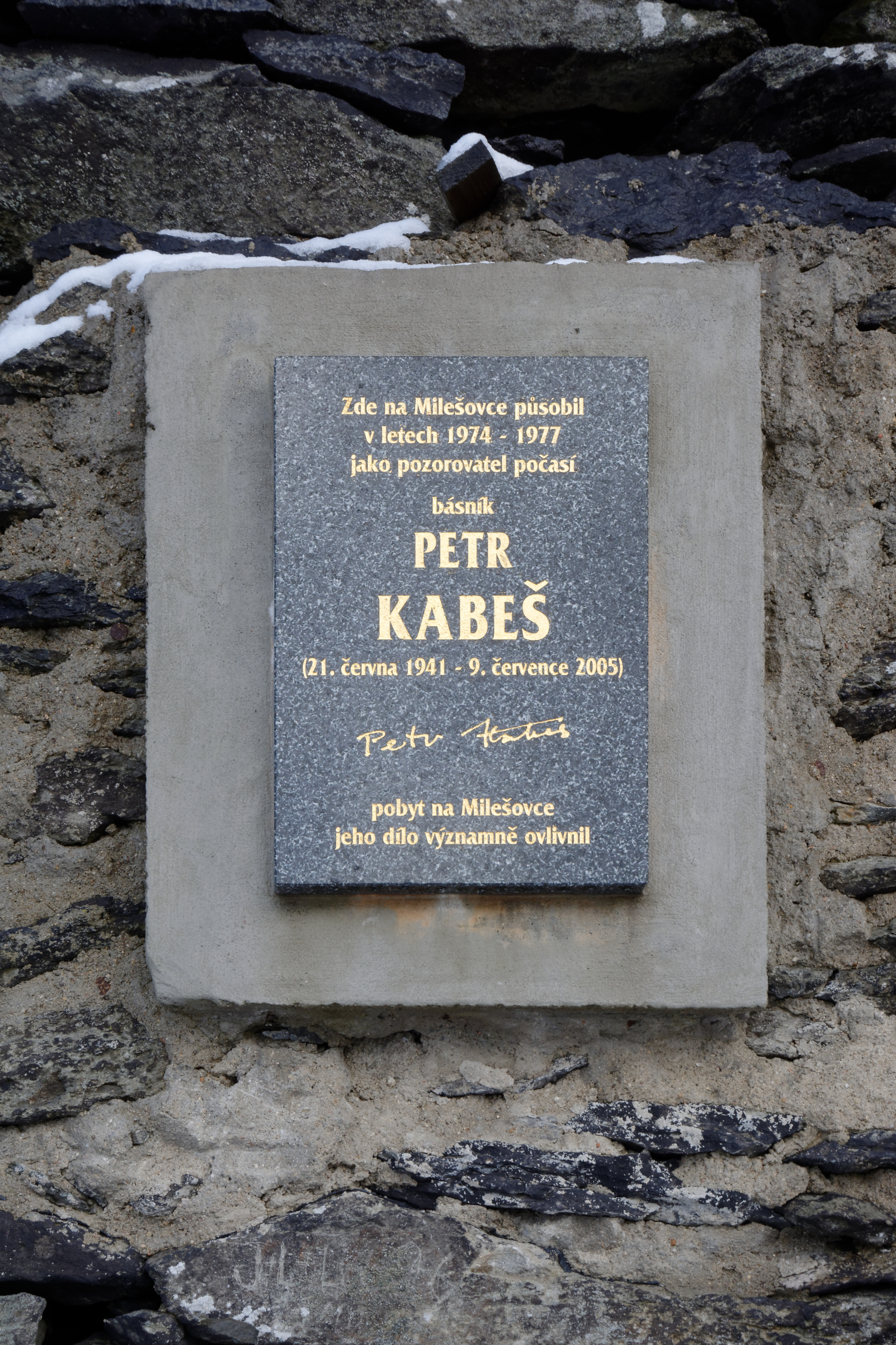 Milešovka, pamětní deska básníka Petra Kabeše